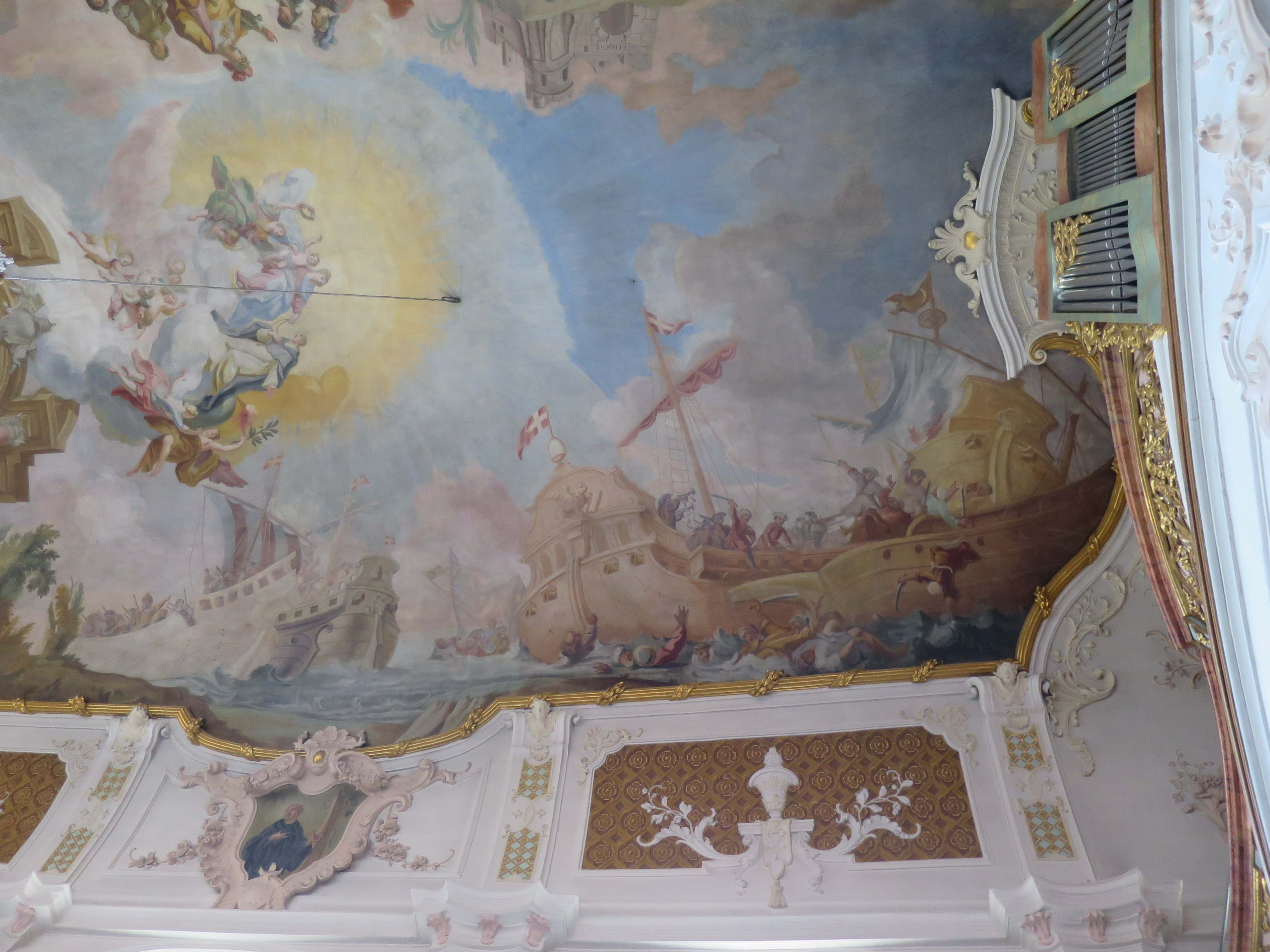 Die Schlacht von Lepanto. Deckenfresko von Johann Baptist Zimmermann 1738-1740 in der Pfarrkirche Mariä Himmelfahrt in Prien. (Ausschnitt)